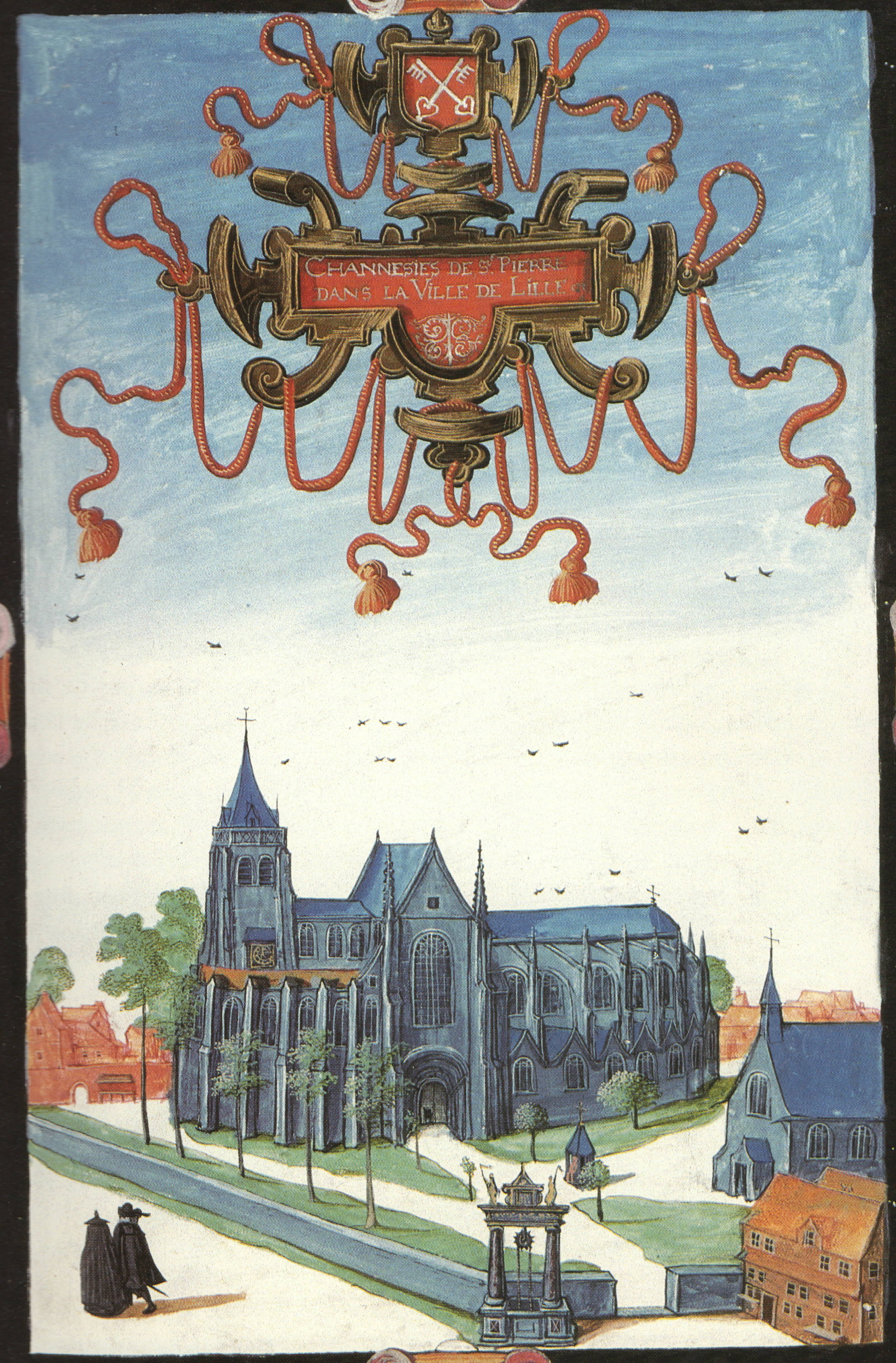 Illustration de la Collégiale Saint-Pierre de Lille au XVIIIème iècle